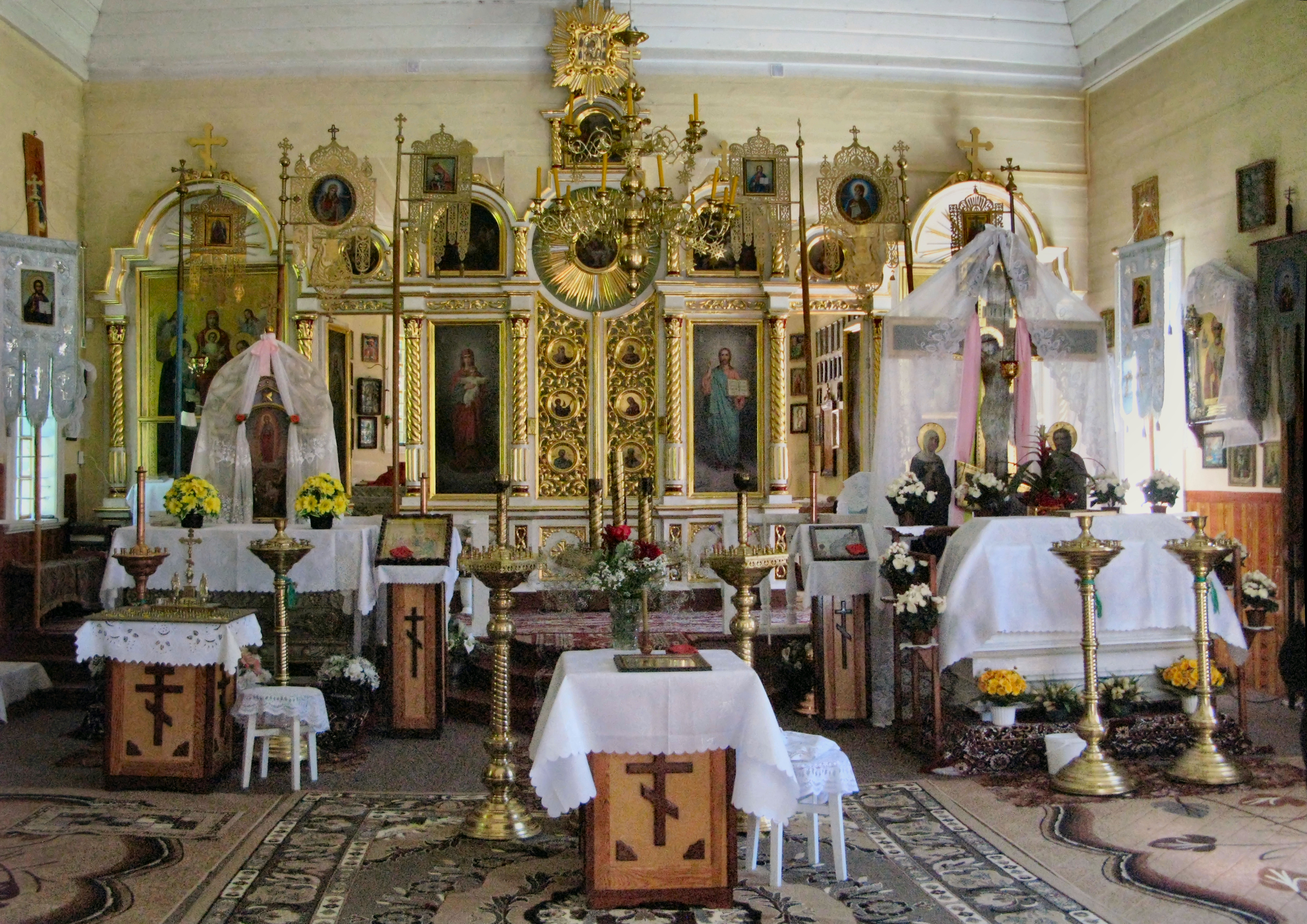 Koterka - cmentarna cerkiew prawosławna parafialna pw. Matki Boskiej Wszystkich Strapionych Radość, 1912